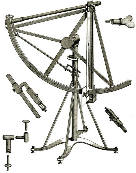 Canivetscher Quadrant